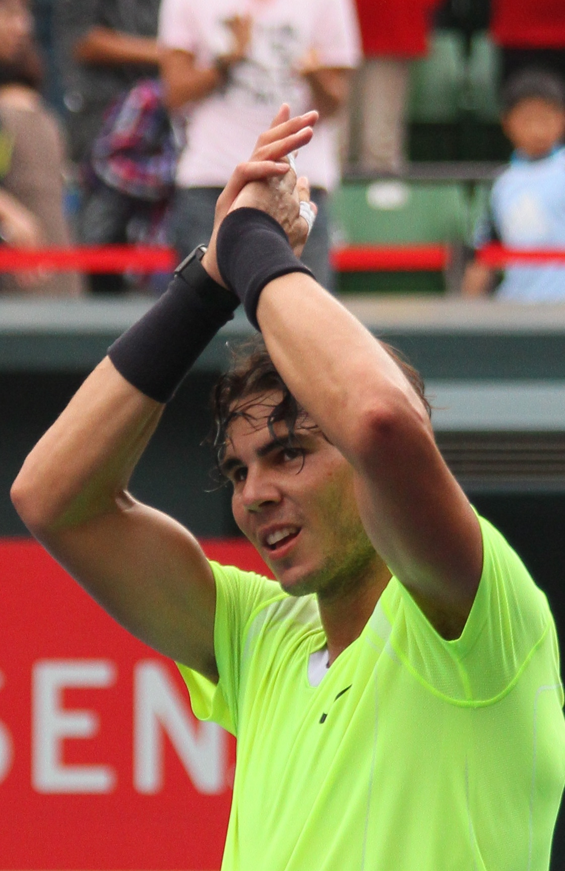 Rafael Nadal, en el torneo ATP de Tokio 2010.